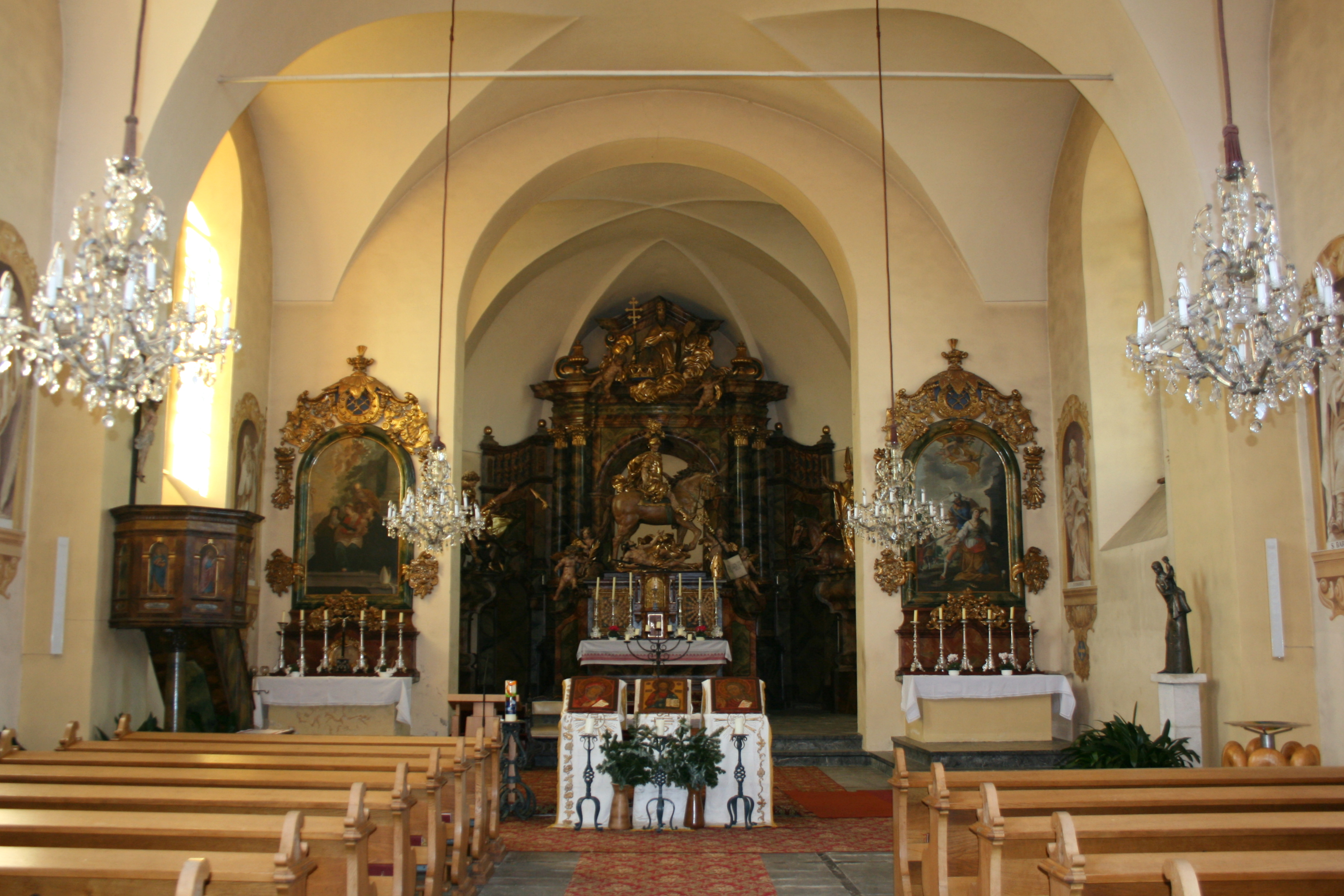 Kath. Filialkirche hl. Martin/Schlosskirche